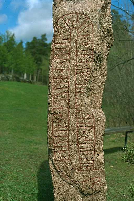 Inskriften lyder: Tore Skorpa reste denna sten efter sin son Kättil. Motiv: Vg11 Leksberg Nyckelord: Runor Kategori: Runristning/runsten Inskriften lyder: Tore Skorpa reste denna sten efter sin son Kättil.